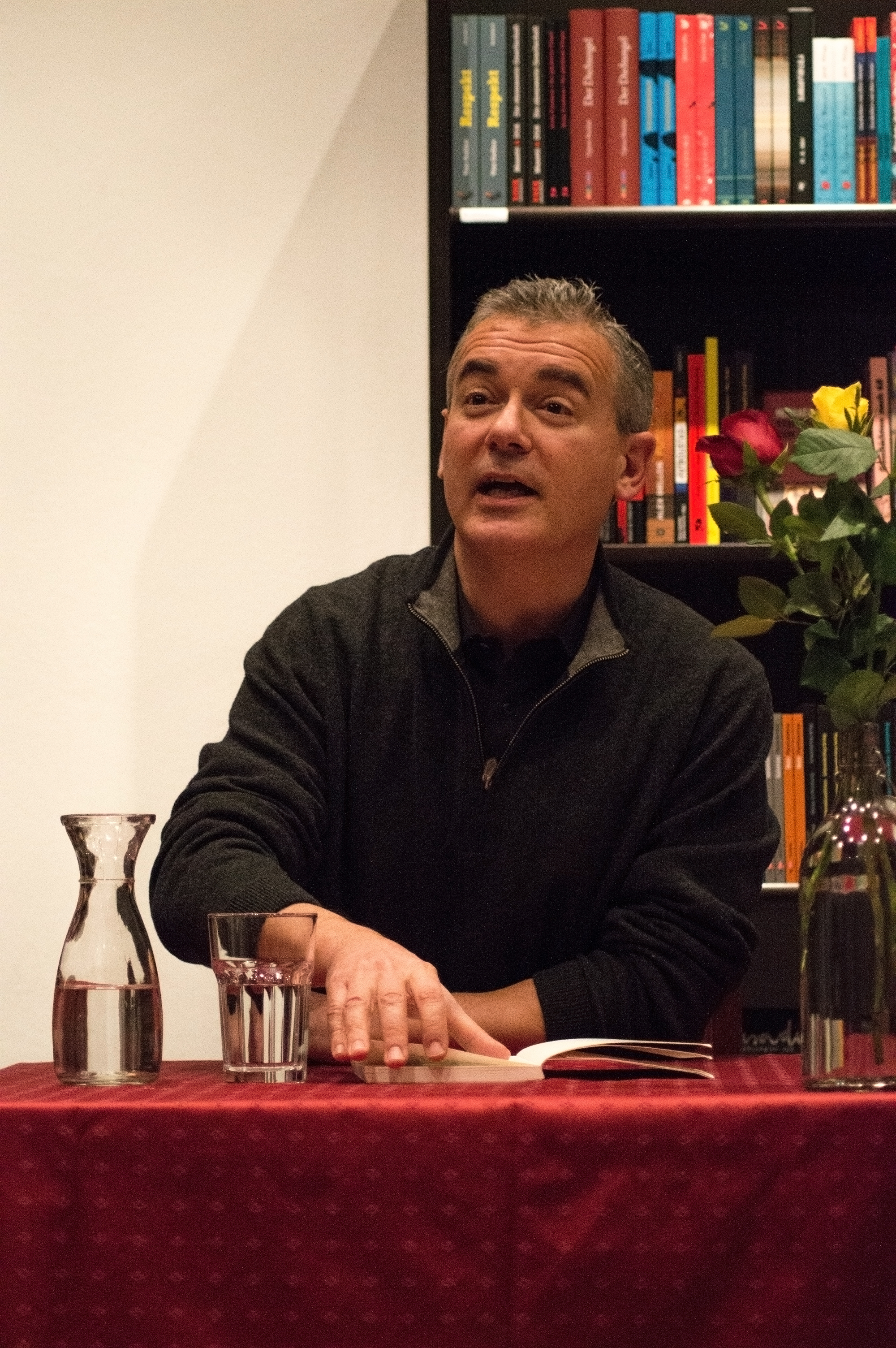 Lesung von Ilija Trojanow am 2. Dezember 2013 bei der Eröffnung der Wiener Buchhandlung Libreria Utopia